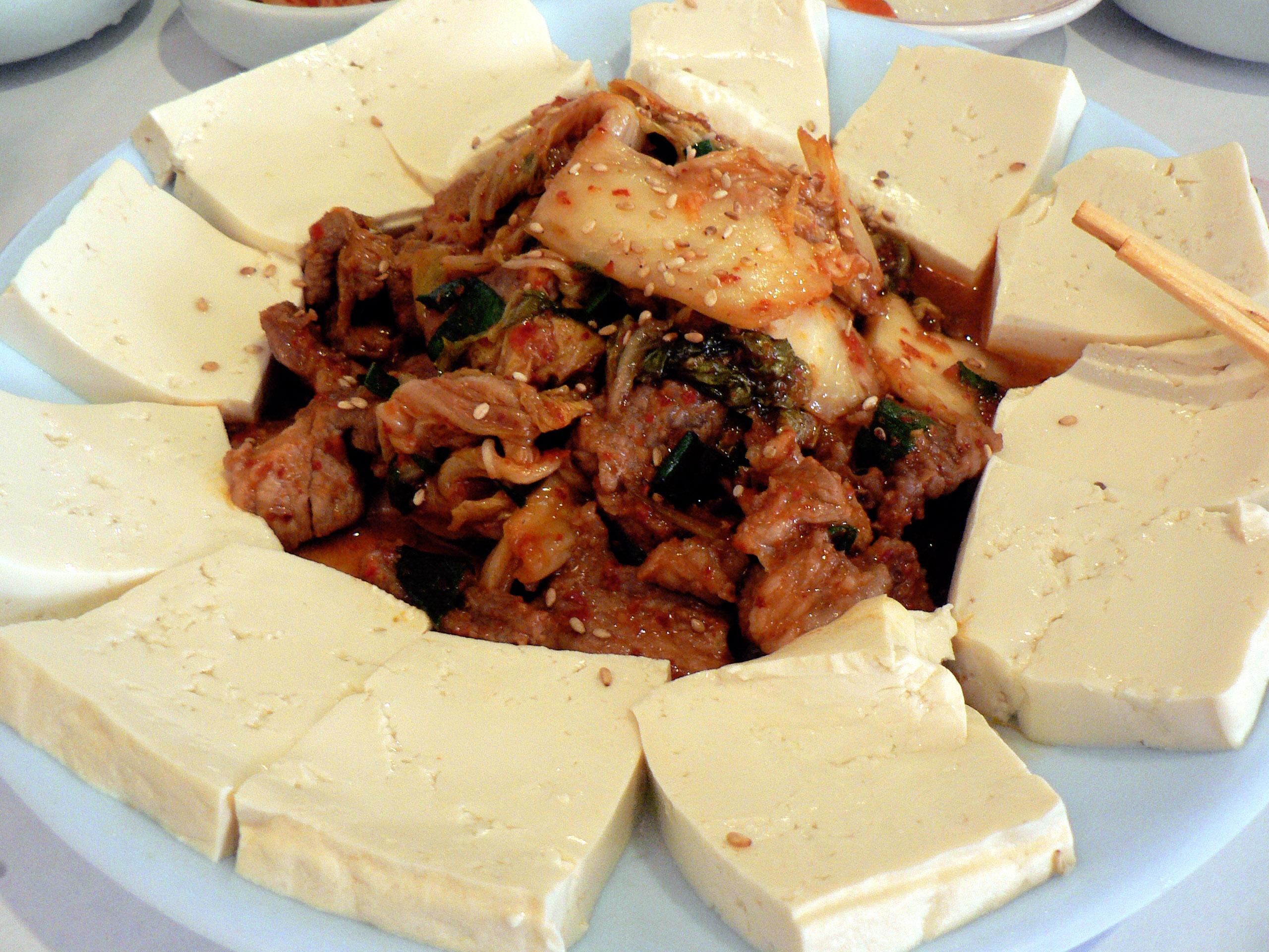 두부 김치